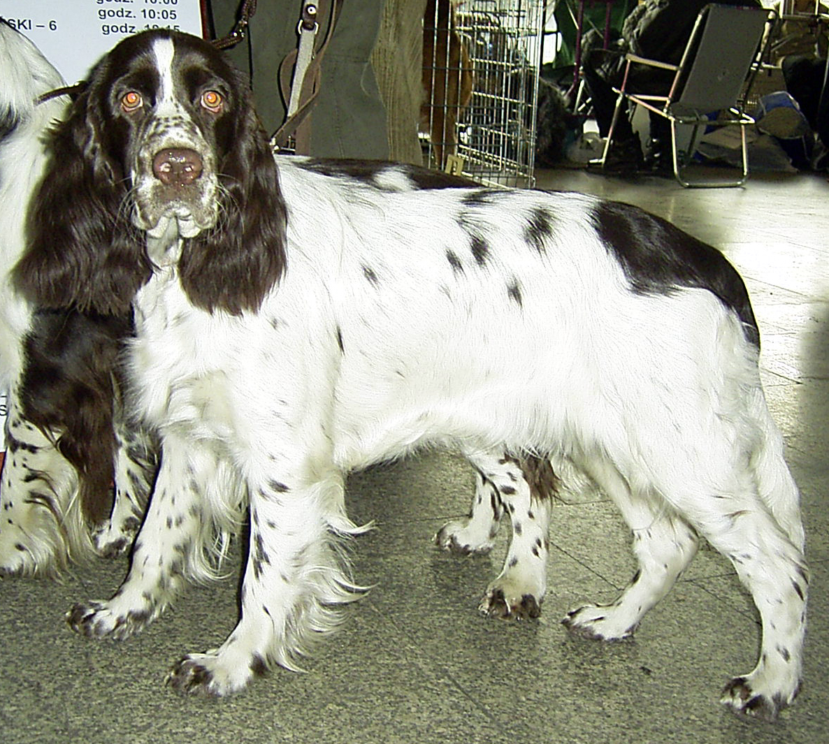 Springer_spaniel_angielski